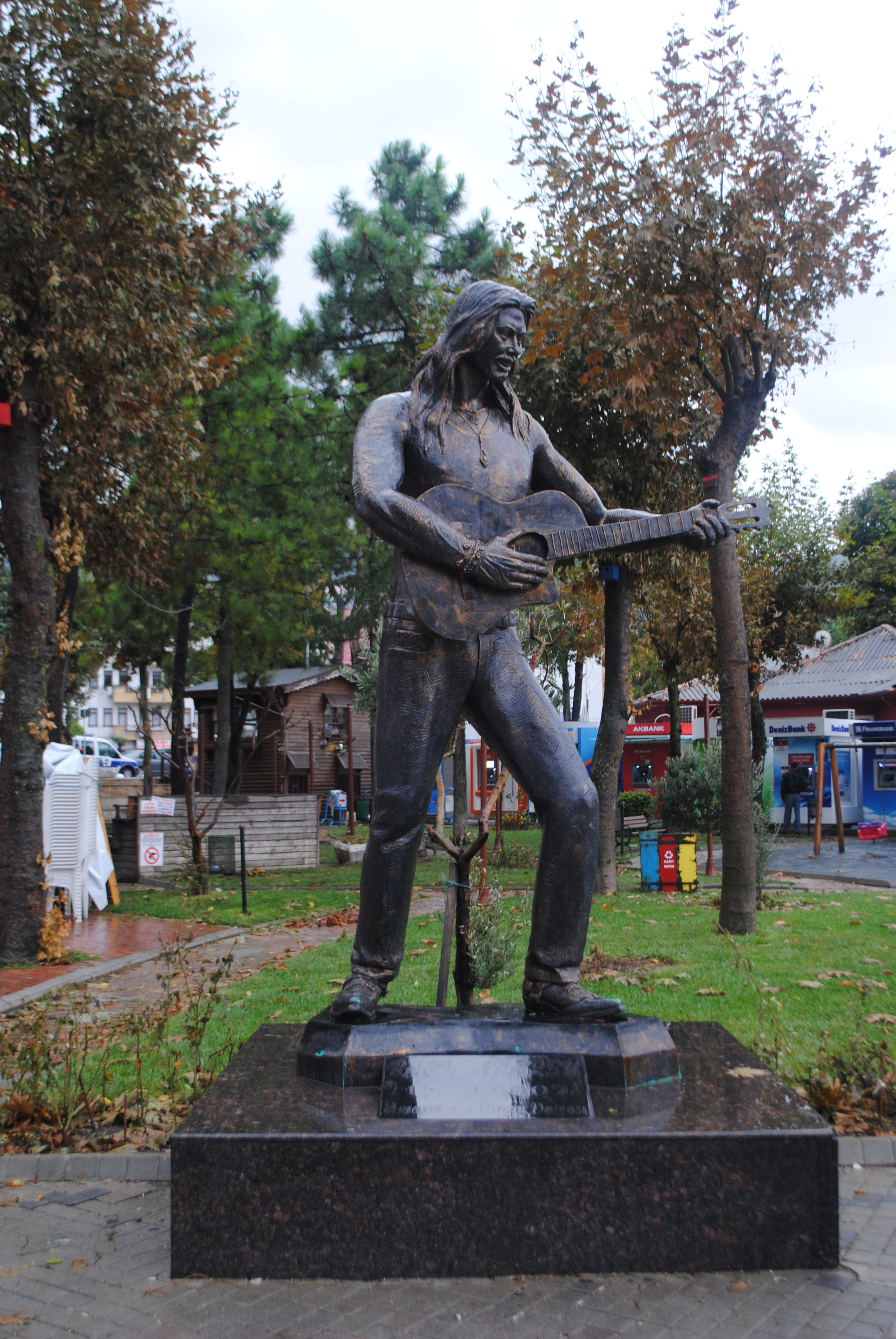 Amasra'dan çeşitli görüntüler